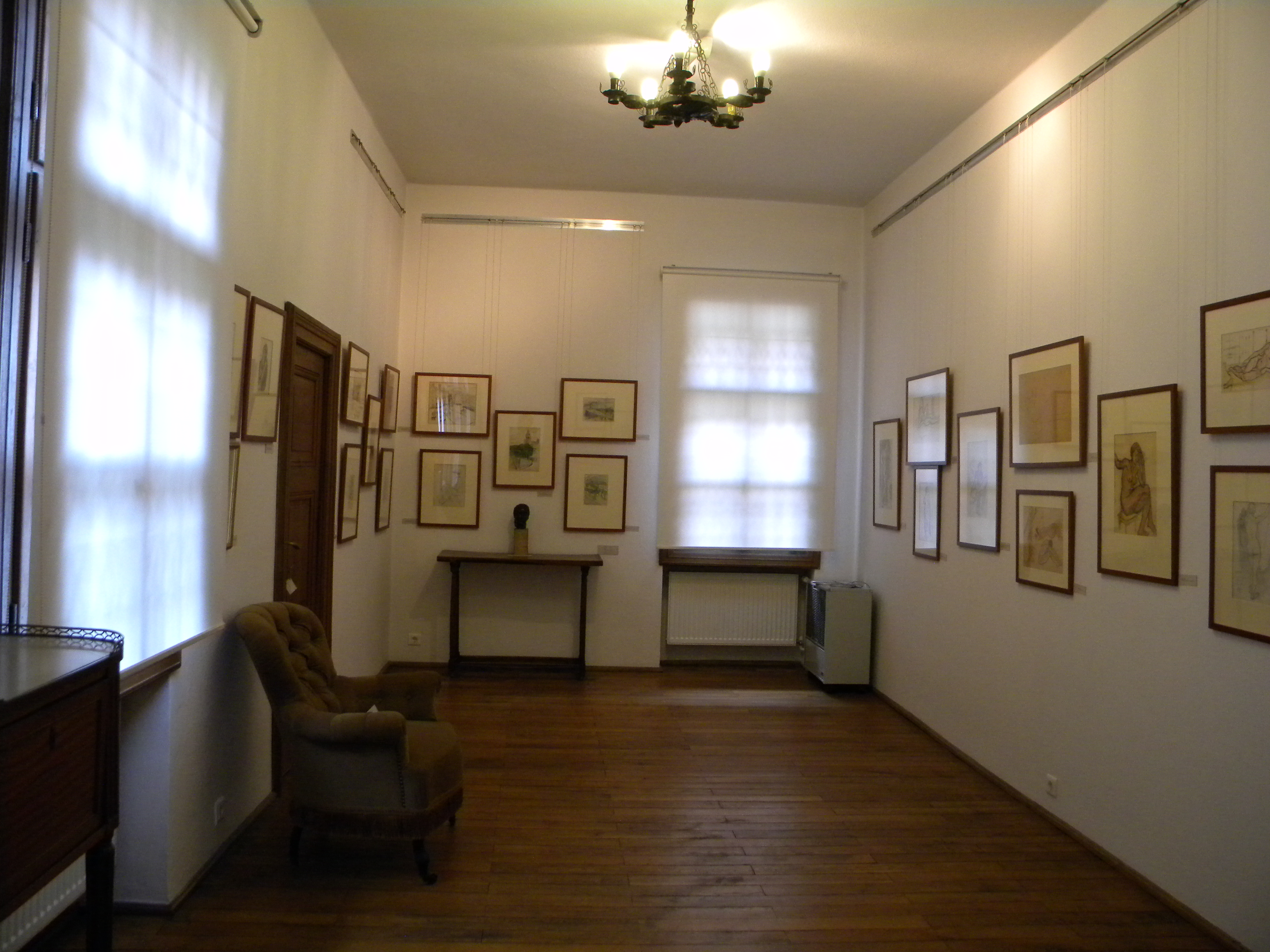 Bucuresti, Romania, Muzeul Theodor Pallady, (Casa Melik), Str. Spatarului nr. 22 (interior 14); B-II-m-A-19723